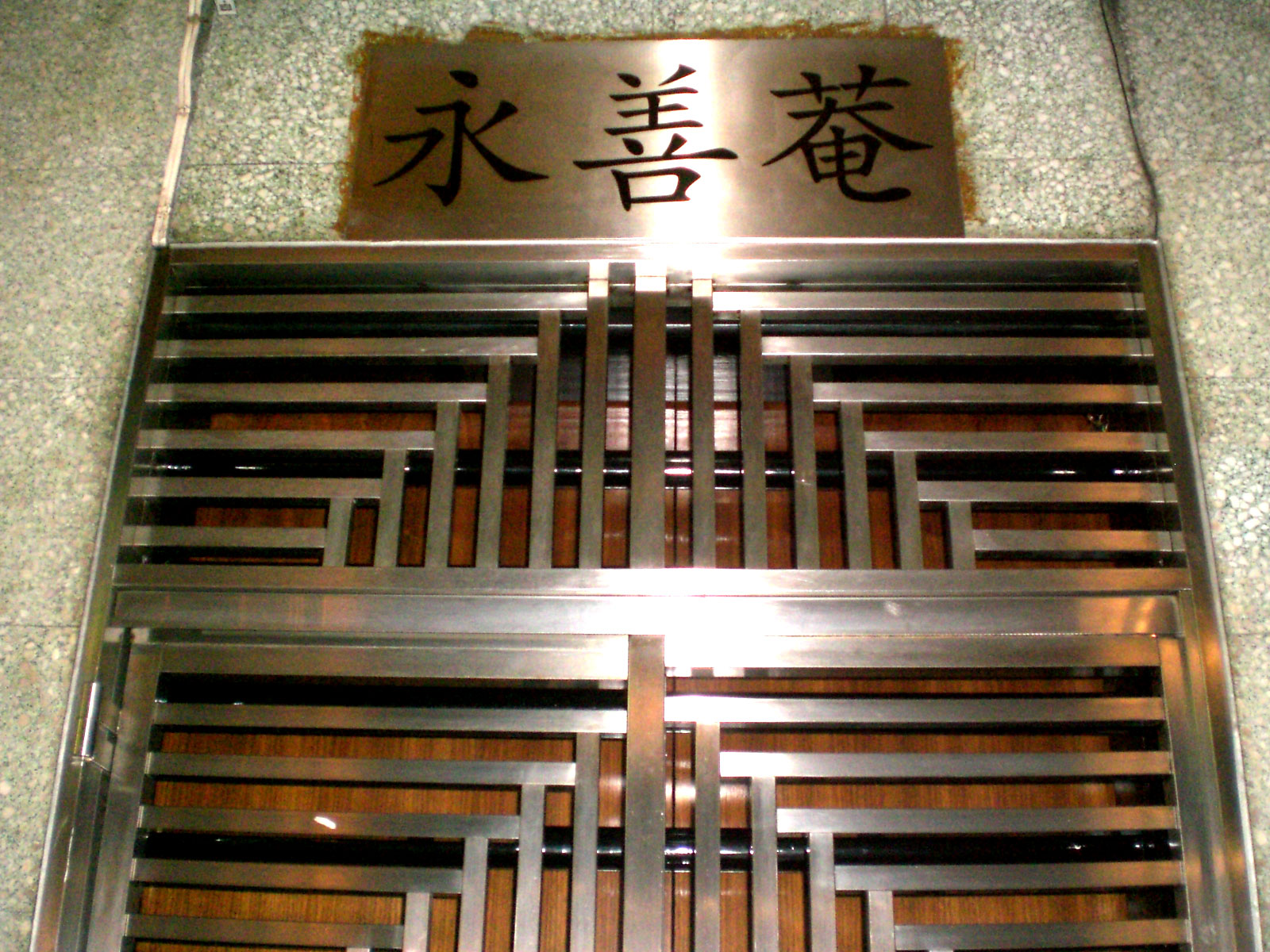 孫中山史蹟徑第12站, 永善庵, 中環士丹頓街13號